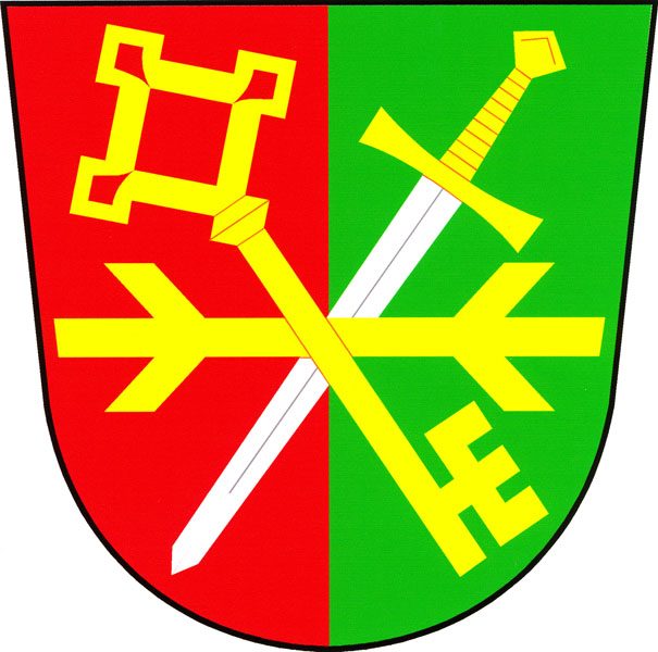 Znak obce Libkov (okres Chrudim)